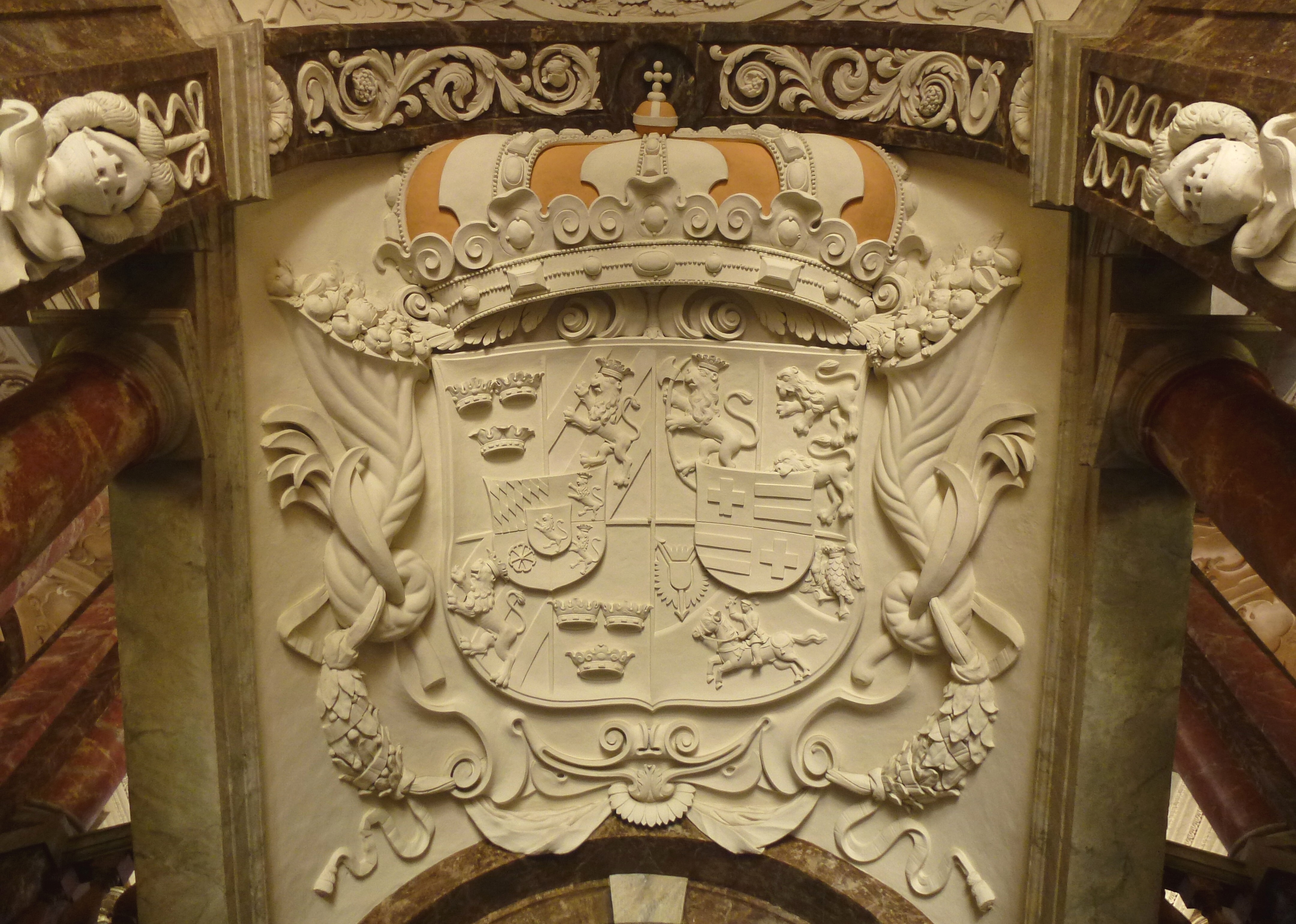 Drottningholms slott, trapphus, Hedvig Eleonoras vapensköld, utförd av Giovanni Carove